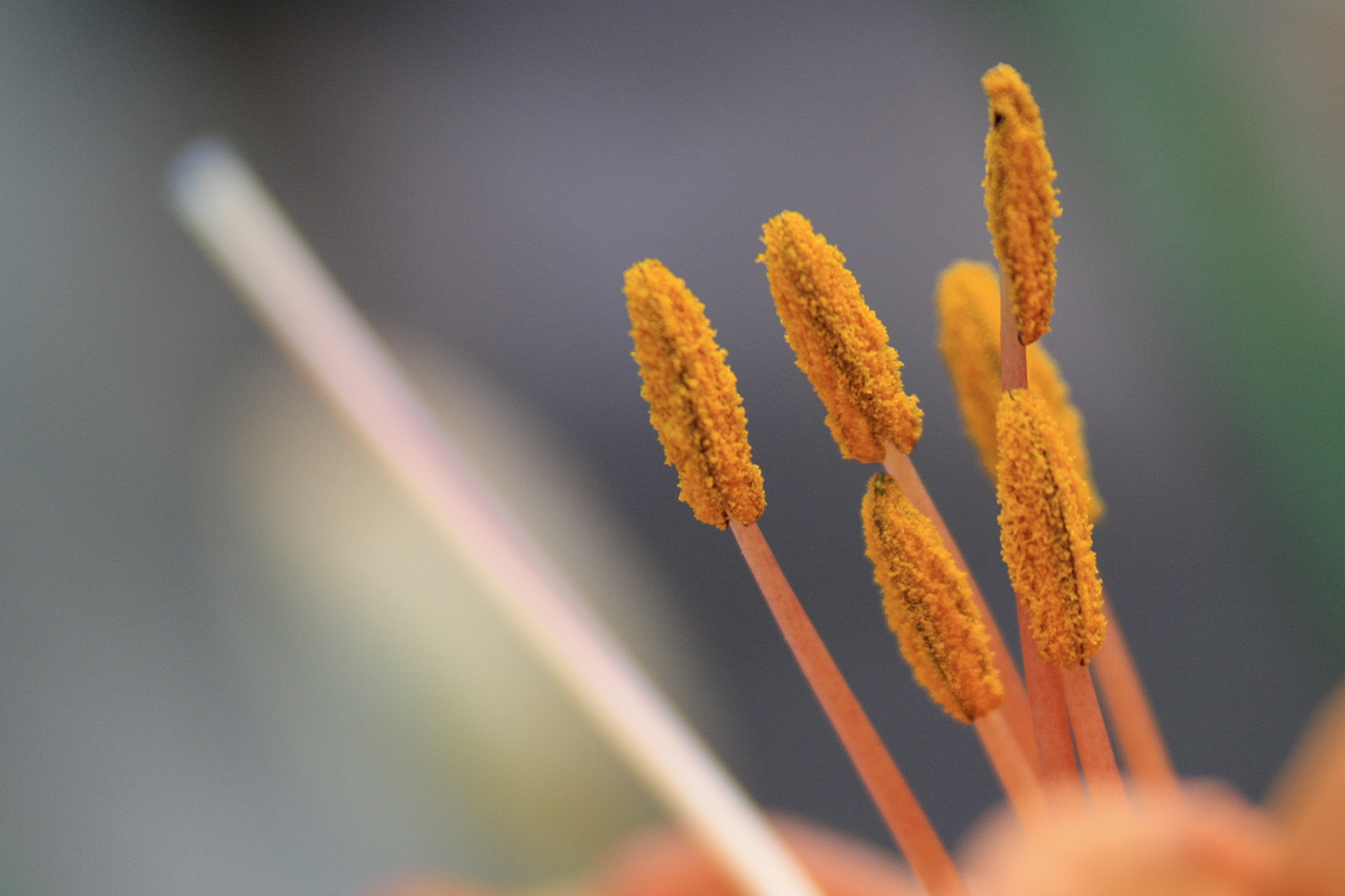 Gelbrote Taglilie (Staubblätter)